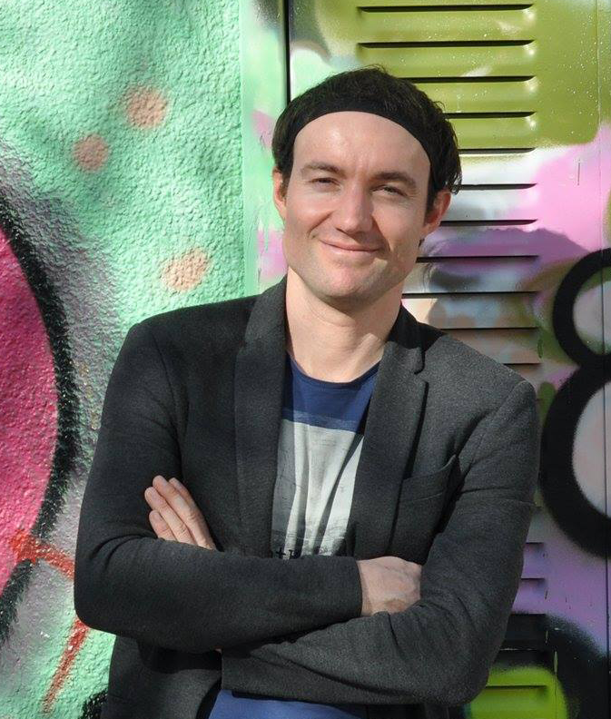 Portraitfoto von Joachim Kovacs im Jahr 2017